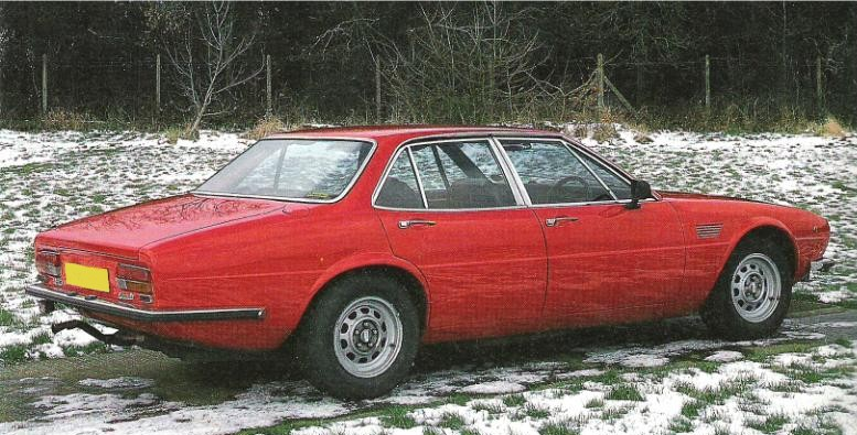 De Tomaso Deauville in Edinburgh Sonstiges:JPEG-Bild, Abmessungen; 777 x 395, 119kb Lizenz:Ich stimme der Public-Domain Lizenz zu und veröffentliche das Foto.